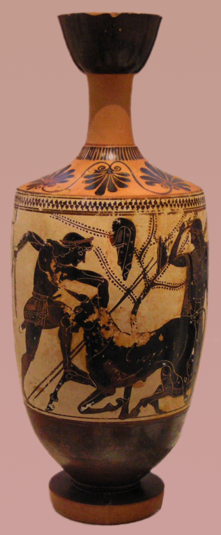 Lekythos à fond blanc, provenant d'Érétrie, vers 500 av. J.-C. Thésée et le taureau de Marathon, par le peintre d'Édinburg. Musée archéologique national, Athènes, n°1124. Version avec fond coloré de Image:NAMA Thésée & taureau.png.